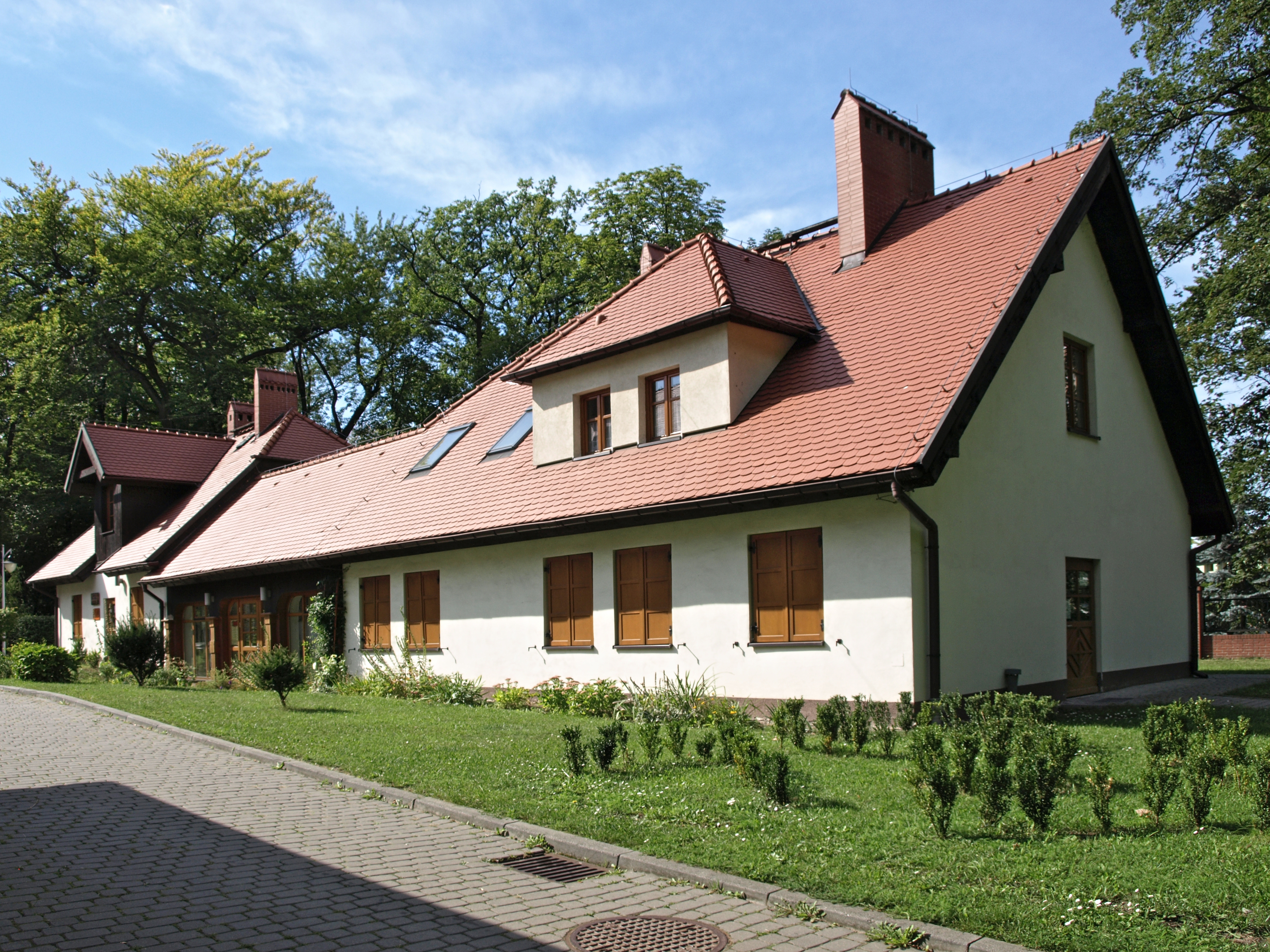 Izba Śląska (Gawlikówka) - prezentuje malarstwo Ewalda Gawlika oraz tradycyjny wystrój izby śląskiej. Budynek powstał w latach 1907-1914 i znajduję się przy placu pod Lipami w Katowicach, w dzielnicy Giszowiec